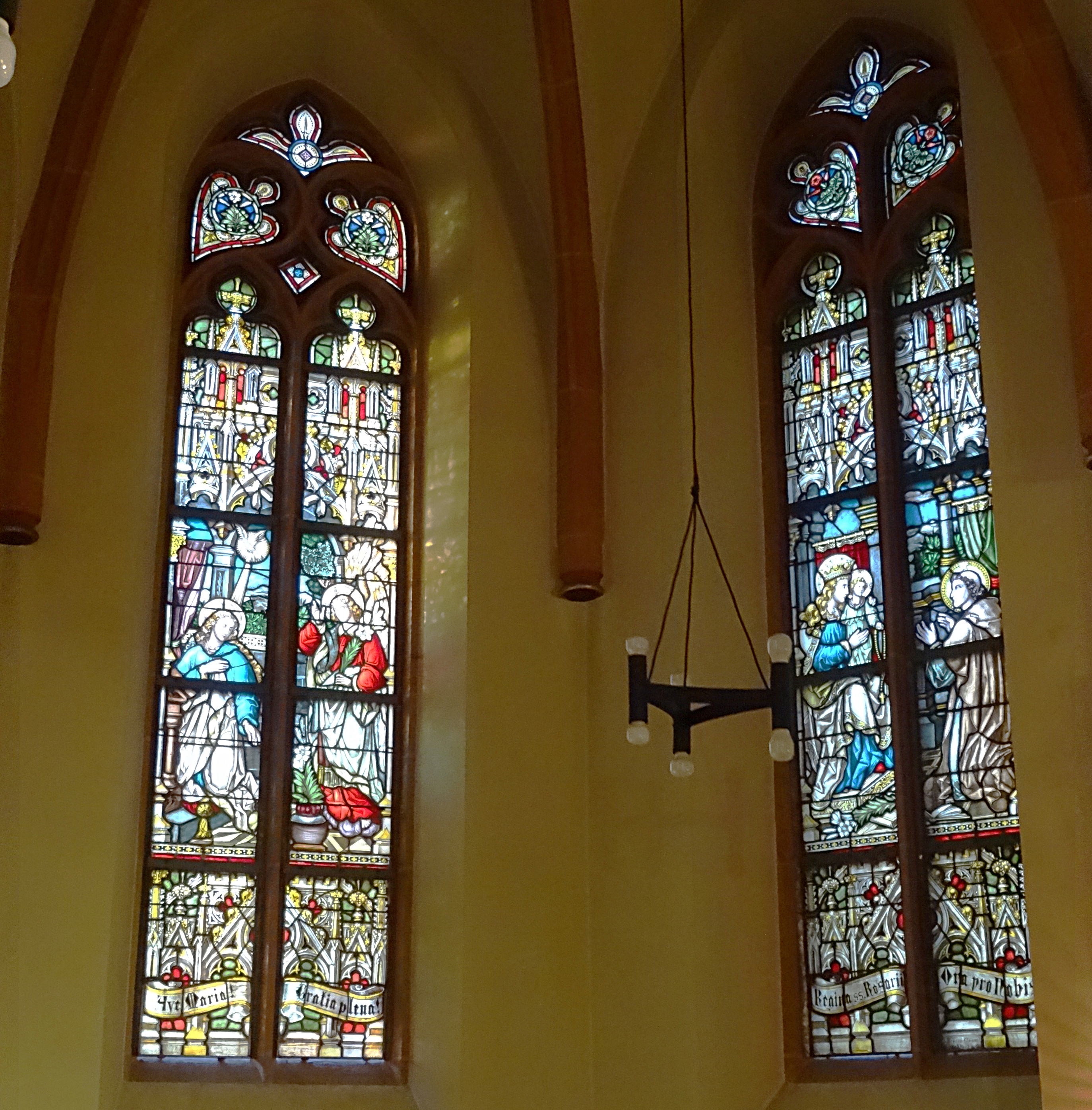 Bleiglasfenster der Seitenkapelle in der Pfarrkirche St. Bonifatius Apolda. Links die Verkündigungsszene des Engels Gabriel bei Maria. Rechts empfängt der heilige Dominikus aus der Hand Jesu den Rosenkranz.